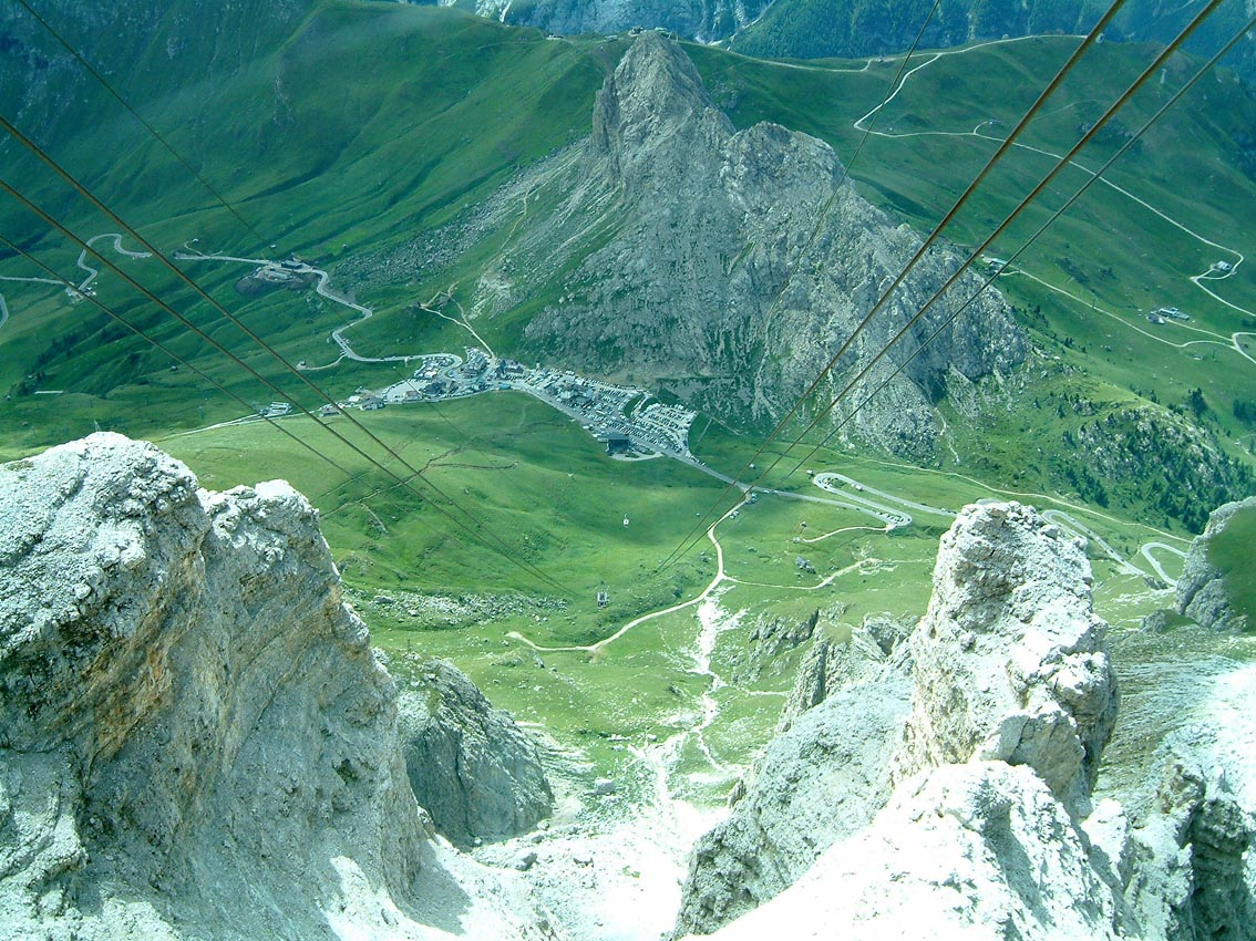 Passo Pordoi visto dal Rifugio Maria (Dolomiti).